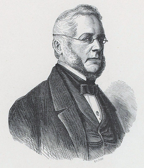 Ritratto di Celso Marzucchi